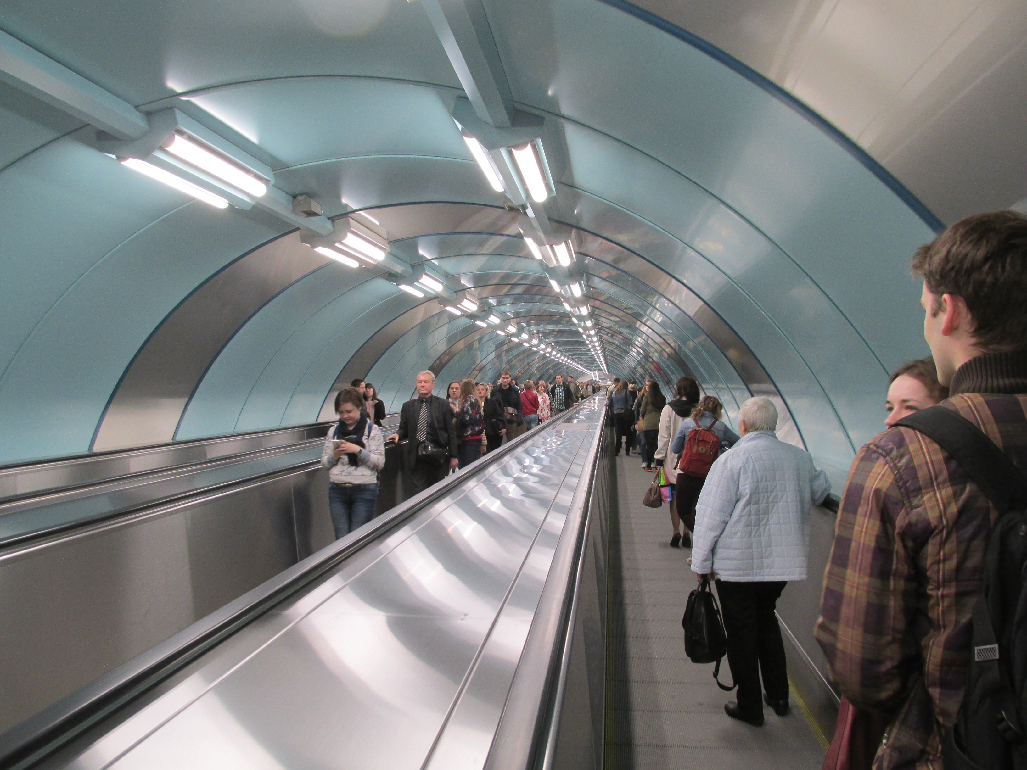 Вестибюль 2 станции метро "Спортивная" расположен на Васильевском острове под предмостной площадью Тучкова моста (наб. Макарова). Вестибюль соединен со станцией метро "Спортивная" наклонным ходом, расположенным под Невой. Общая длина хода около 300 метров. Подземный ход оснащен двумя последовательно расположенными трехполосными траволаторами. Длина каждого из траволаторов составляет 115 метров. Вестибюль 2 открыт для пассажиров в День рождения Санкт-Петербурга 27 мая 2015 года